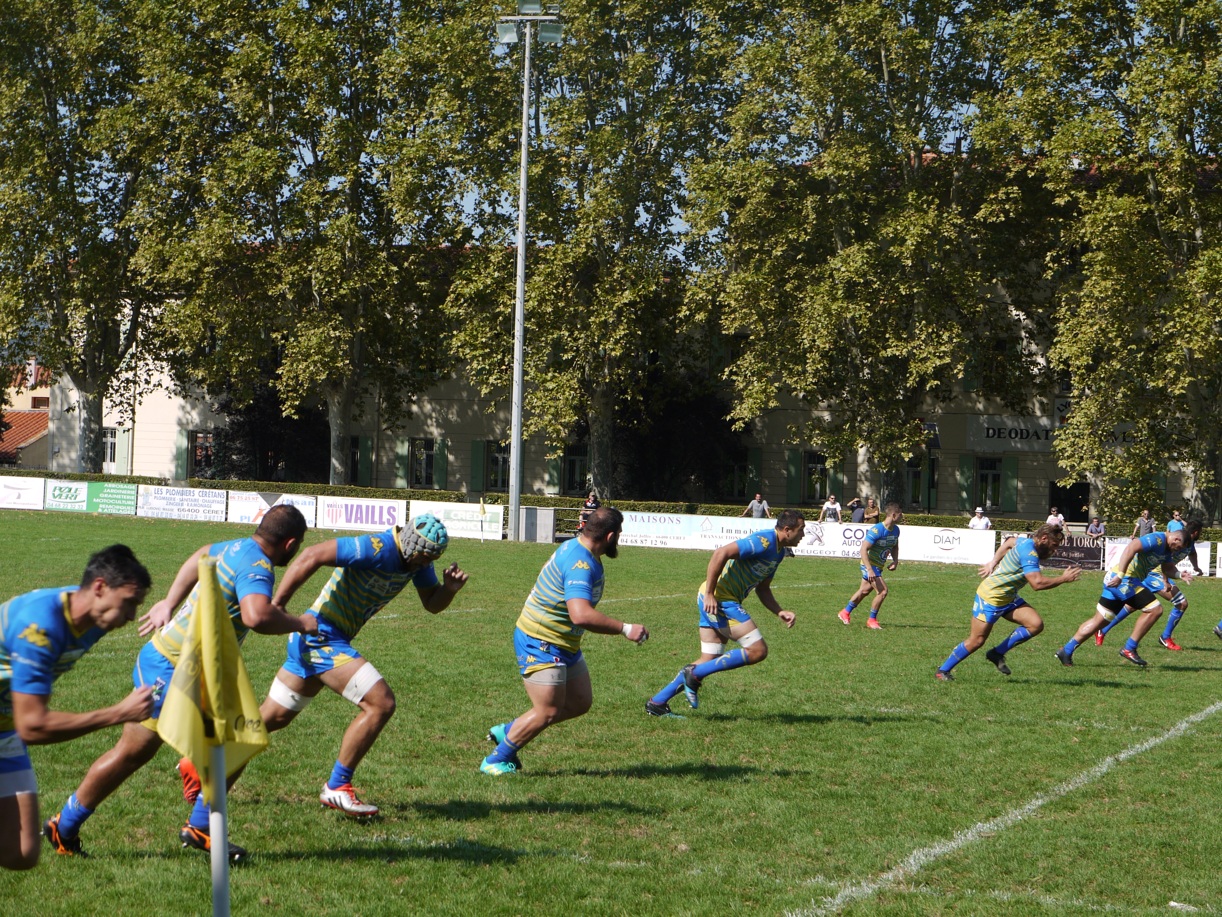 Céret sportif vs RC Aubenas Vals à Céret.